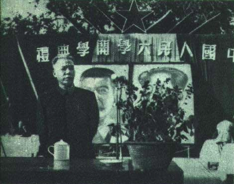 1950年10月，中国人民大学开学，刘少奇在开学典礼上讲话。